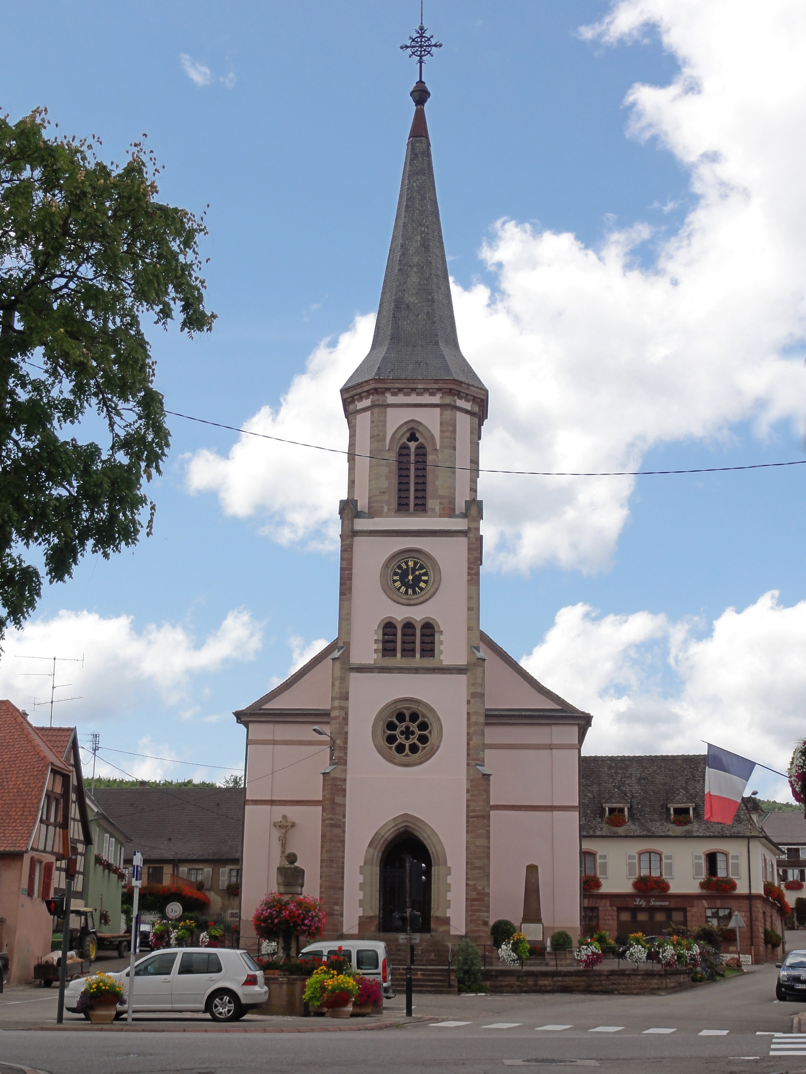 Alsace, Haut-Rhin, Rorschwihr, Église Saint-Michel (XIXe)